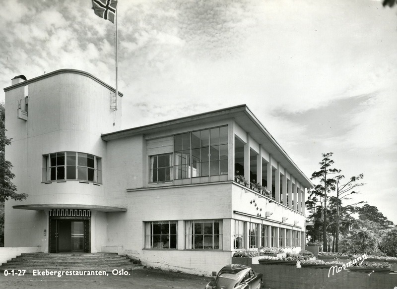 Inngangspartiet til Ekebergrestauranten. Postkort 0-1-27. Friluftsrestaurant. Funksjonalistisk arkitektur.